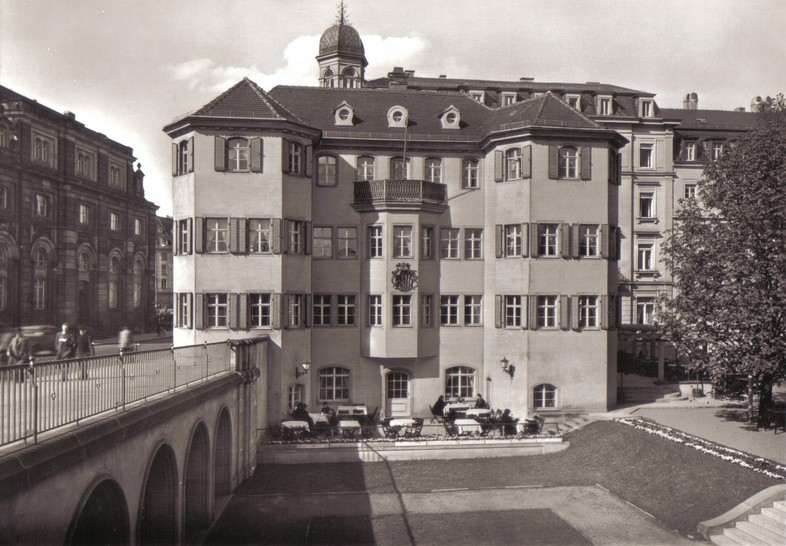 Dresden, Narrenhäusel. Ehemalige Gaststätte am Neustädter Ende der Augustusbrücke. Dahinter der Neustädter Markt mit dem Hotel Kaiserhof (die Kuppel im Hintergrund) und dem Rathaus als Leitbauten, links das Blockhaus.